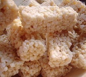 中文（中国大陆）: 赤溪冬米糖